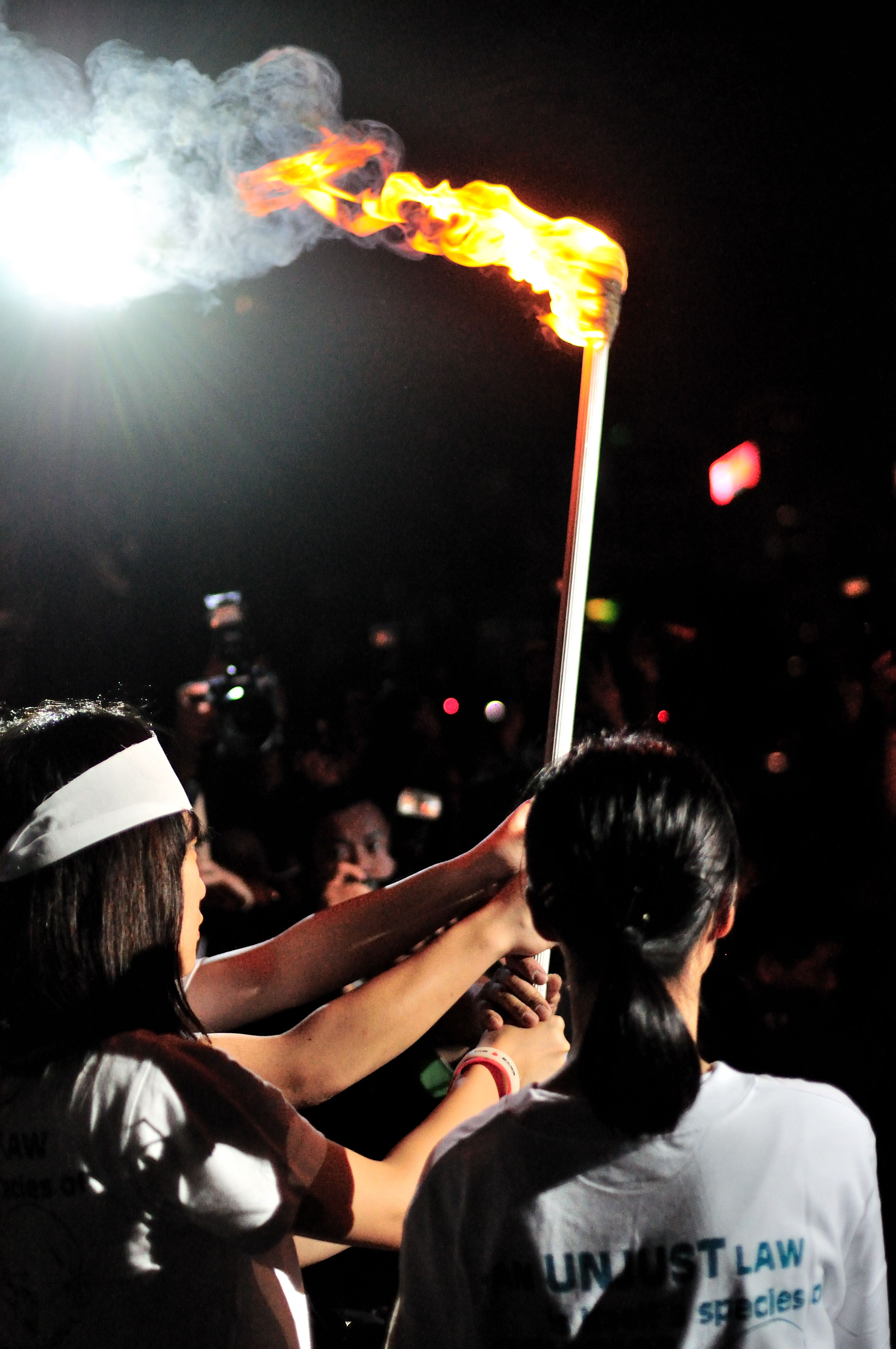 維園平反六四21週年燭光晚會 2010